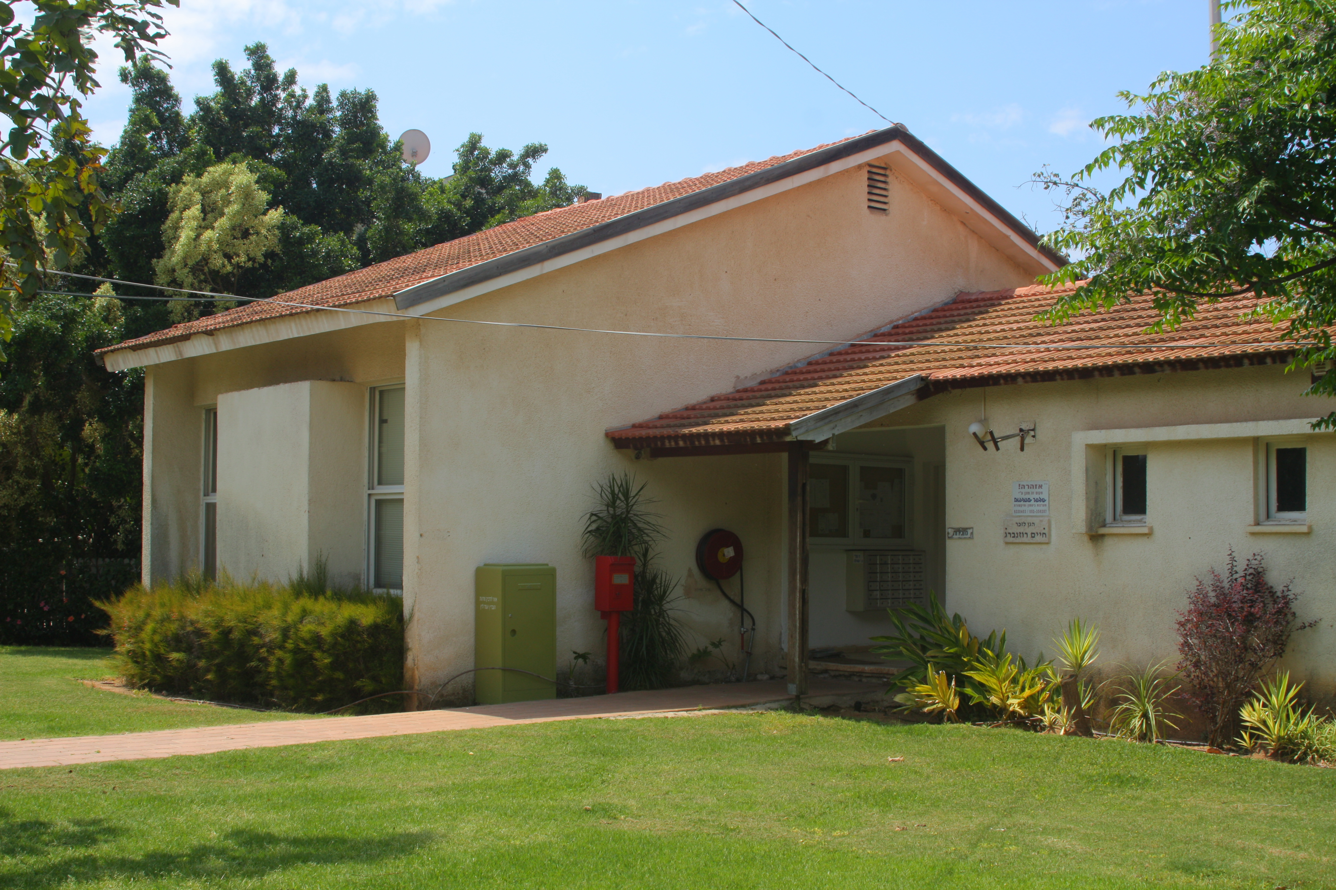 בית המזכירות בביתן אהרון Bitan Aharon secretariat